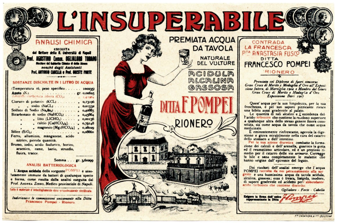 L'insuperabile, etichetta dell'acqua da tavola imbottigliata alla fonte del Rionero in Vulture (PT), sec. XX inizio (AS Potenza, Fondo Prefettura, Atti amministrativi, b. 38)